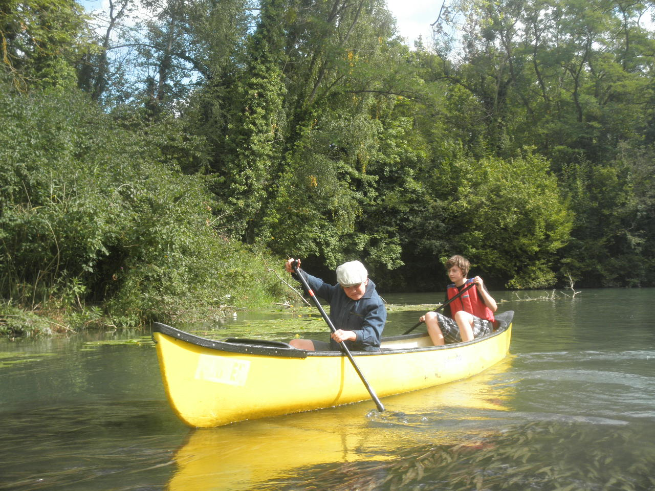 Kanuo en la natura parko Taubergießen